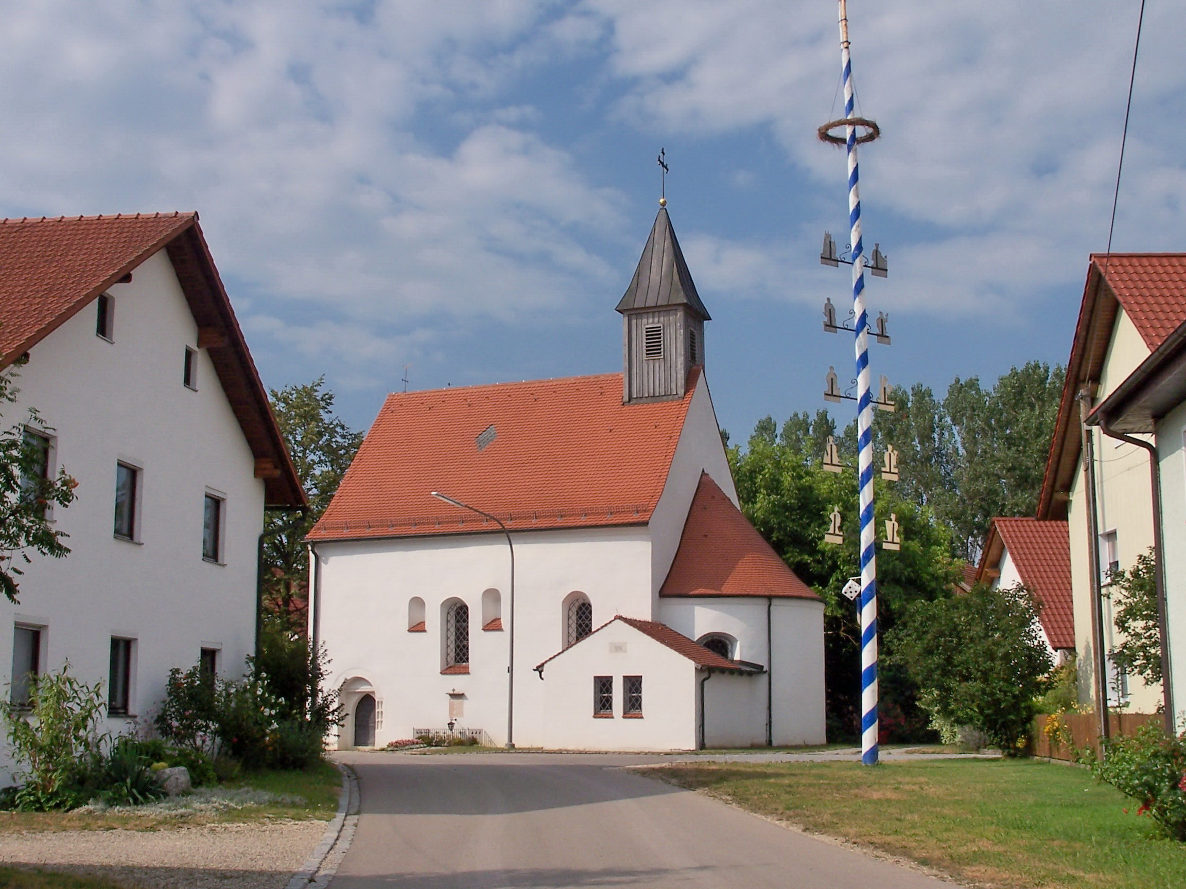 Barbing, Auburg. Katholische Filialkirche St. Stephan, Saalbau mit eingezogener Apsis, Dachreiter und Portal mit Nischenreihe, romanisch, 2. Hälfte 12. Jahrhundert, Veränderungen im 17. Jahrhundert, Dachreiter 1898; mit Ausstattung.